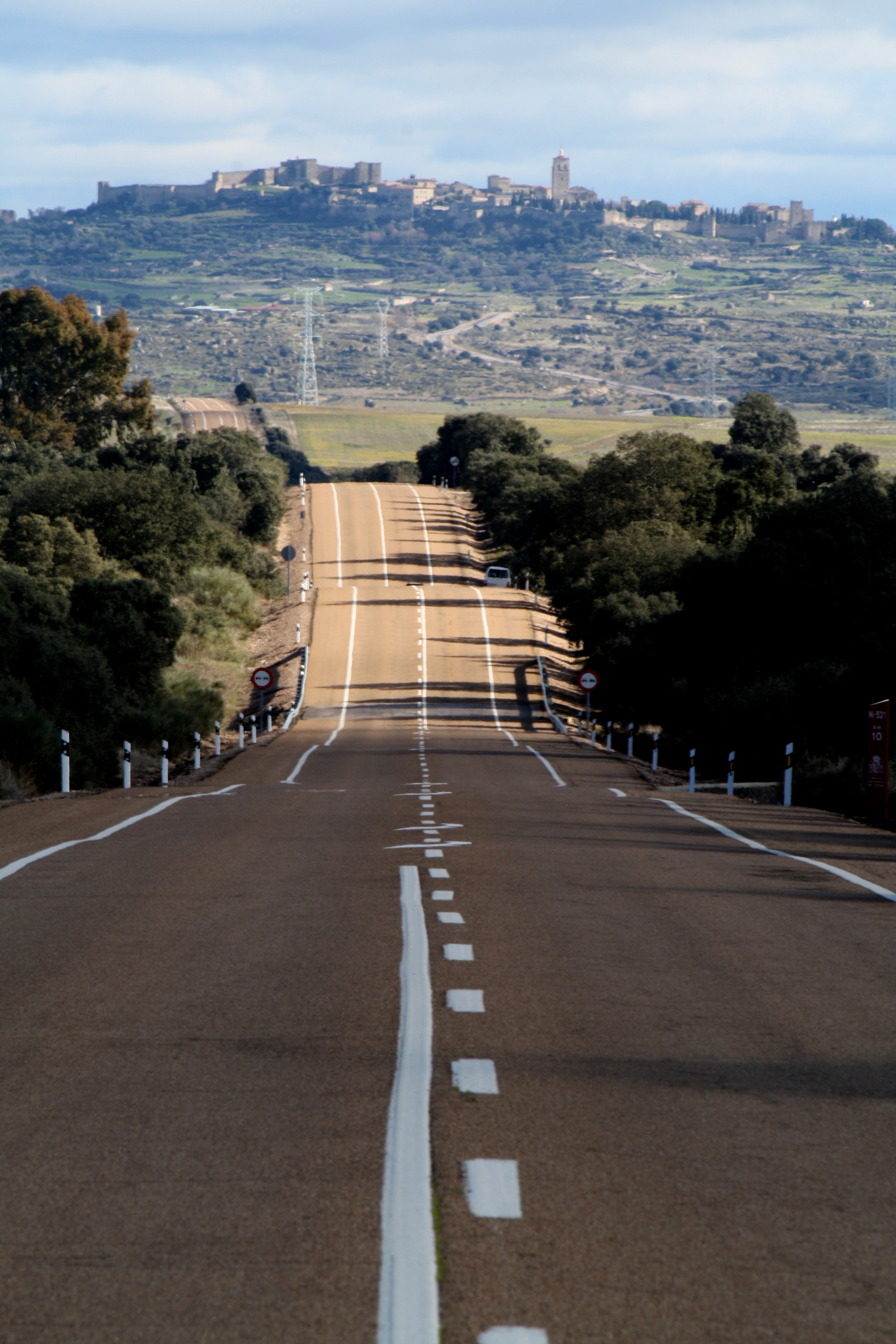 Trujillo, provincia de Cáceres, Extremadura, España.